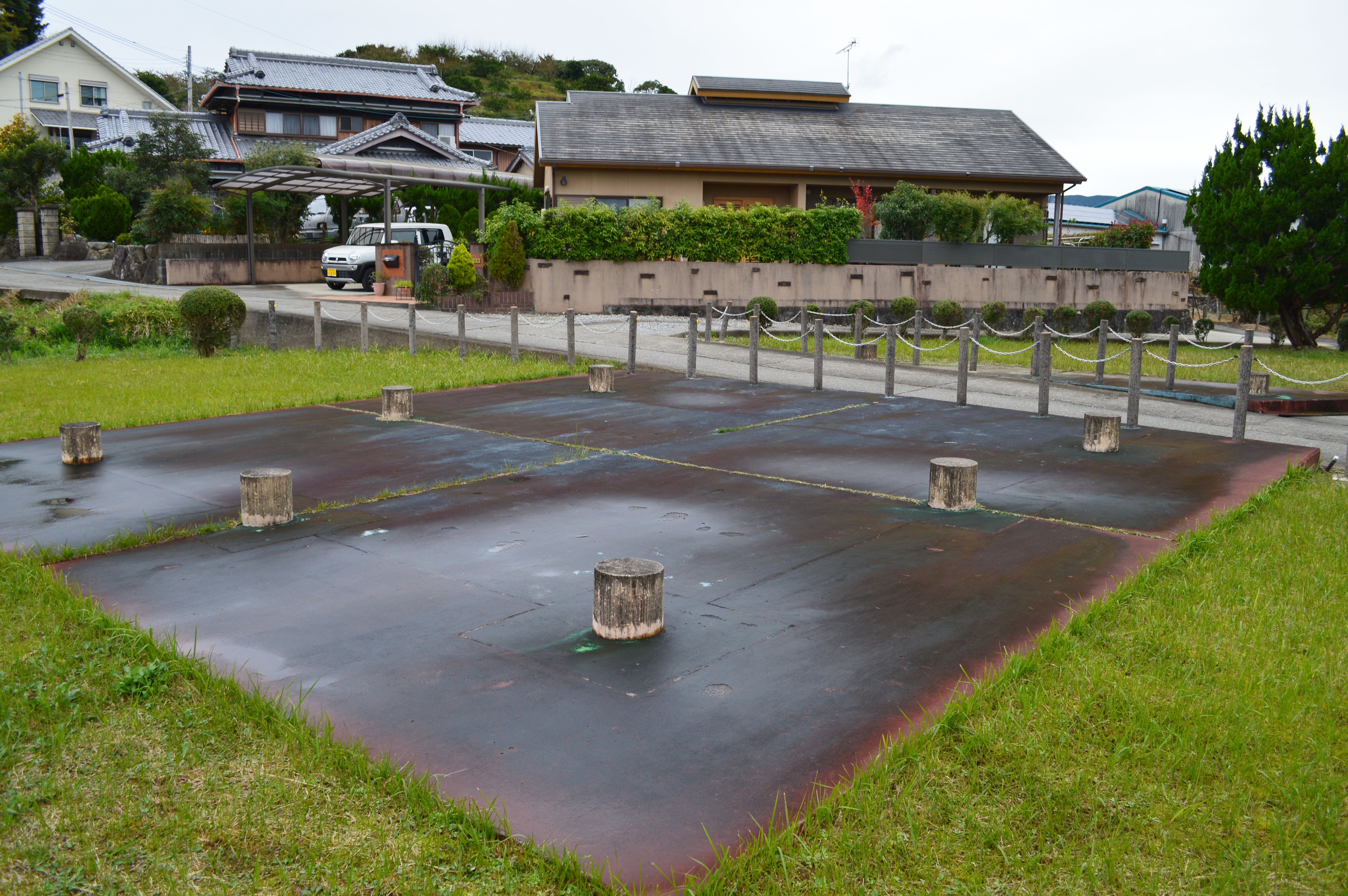 三栖廃寺跡 推定僧坊